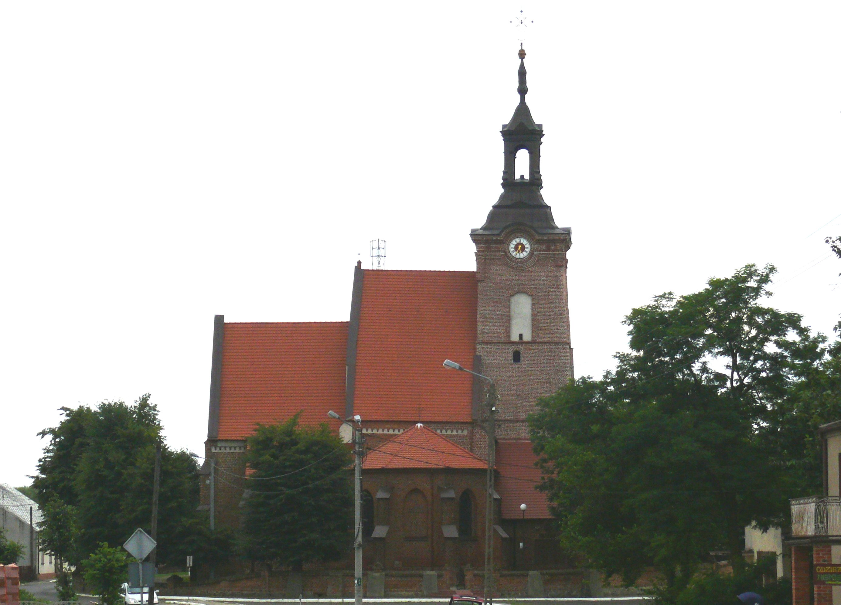 Kościół parafialny w Russocicach IV-73/95/53.